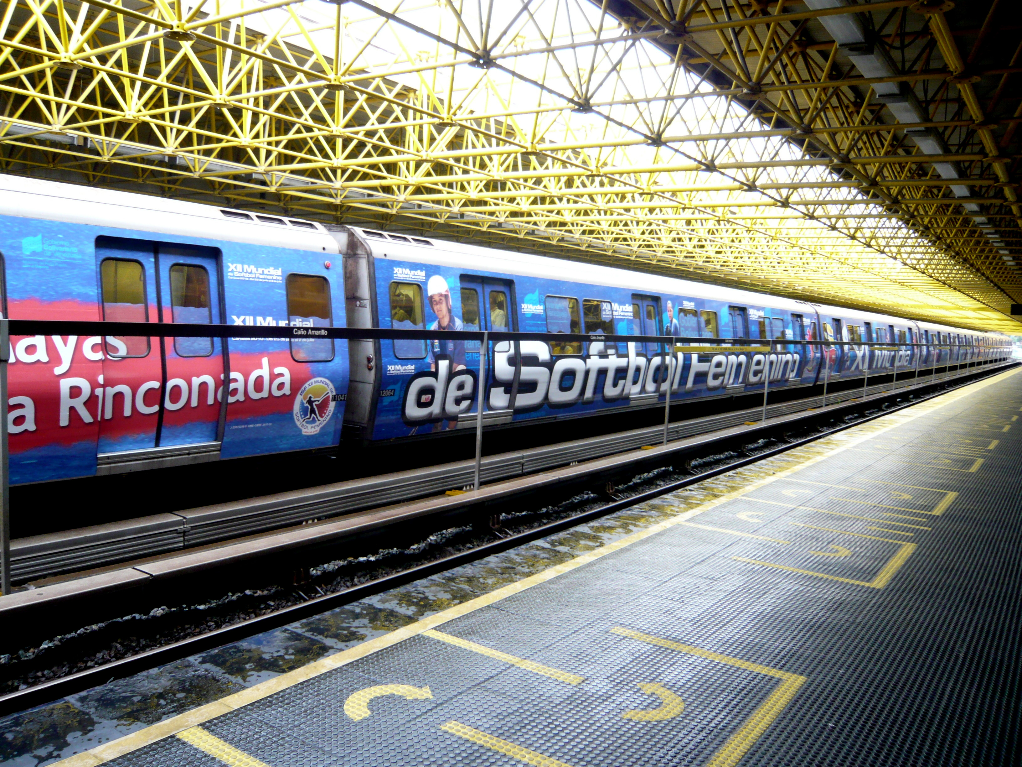 Metro de Caracas en Caño Amarillo